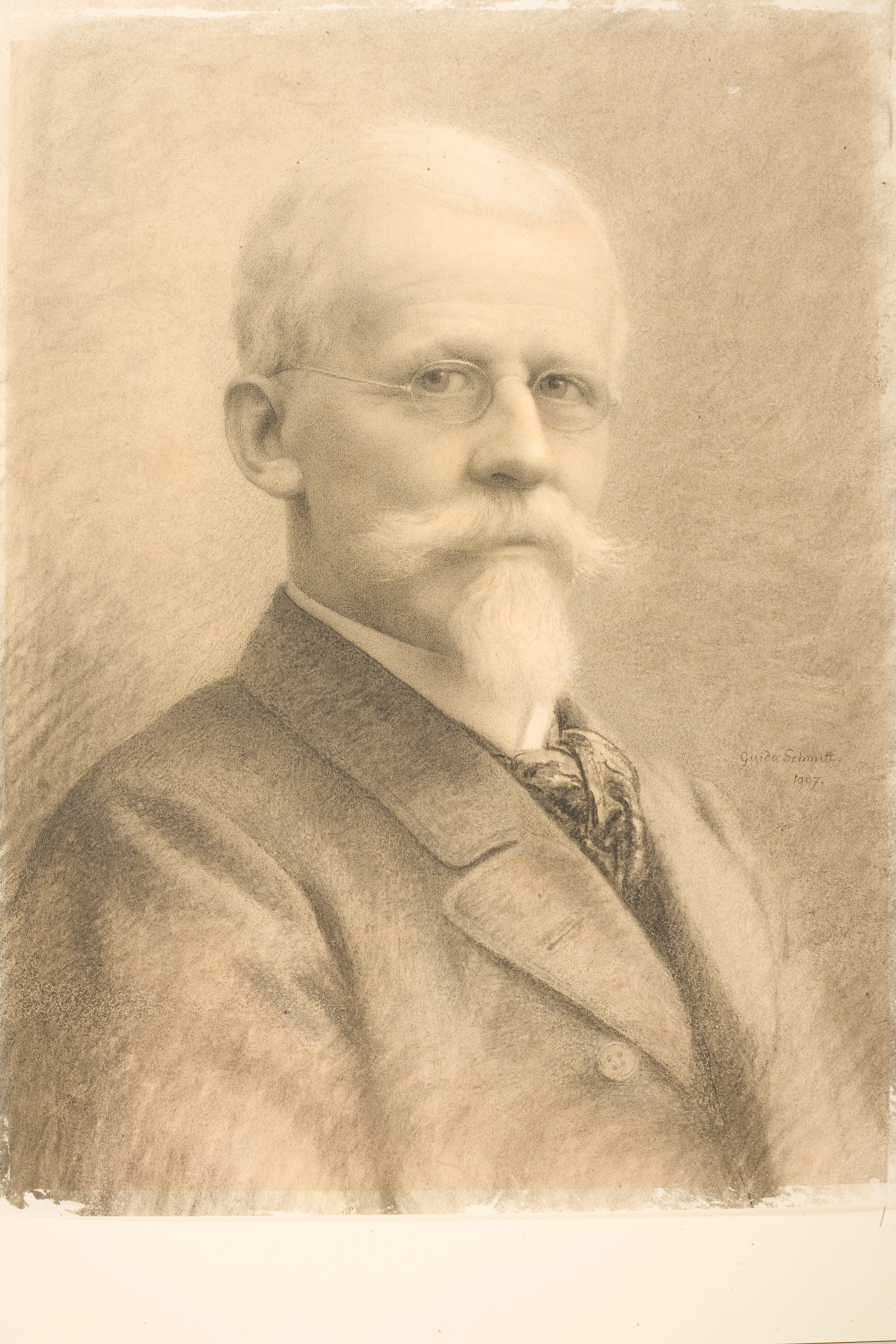 Depicted person: Heinrich Buhl, Jurist, 1875–1907 Professor in Heidelberg